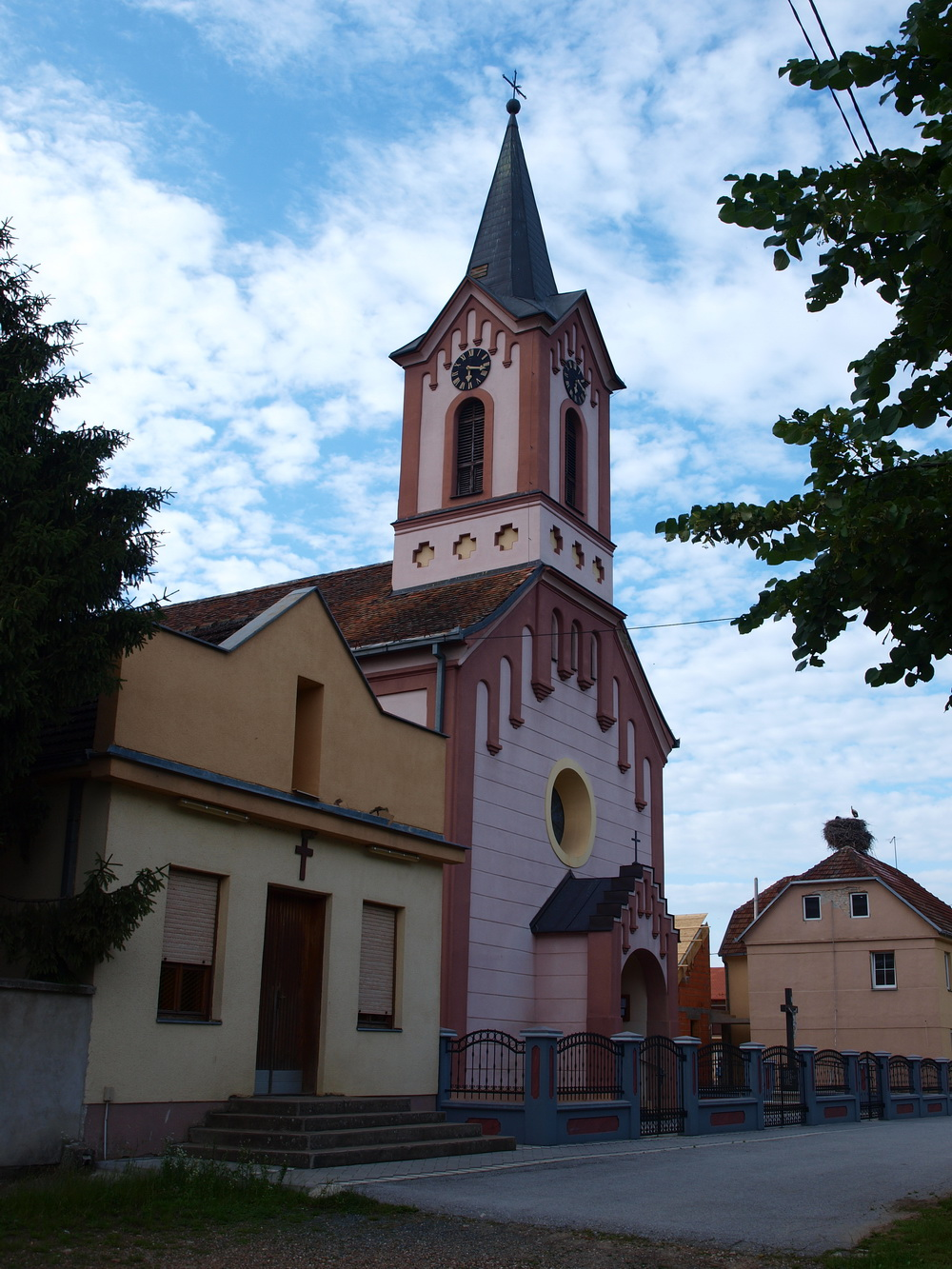 Župna crkva Marije Kraljice i sv. Jurja u naselju Davor u Brodsko-posavskoj županiji.